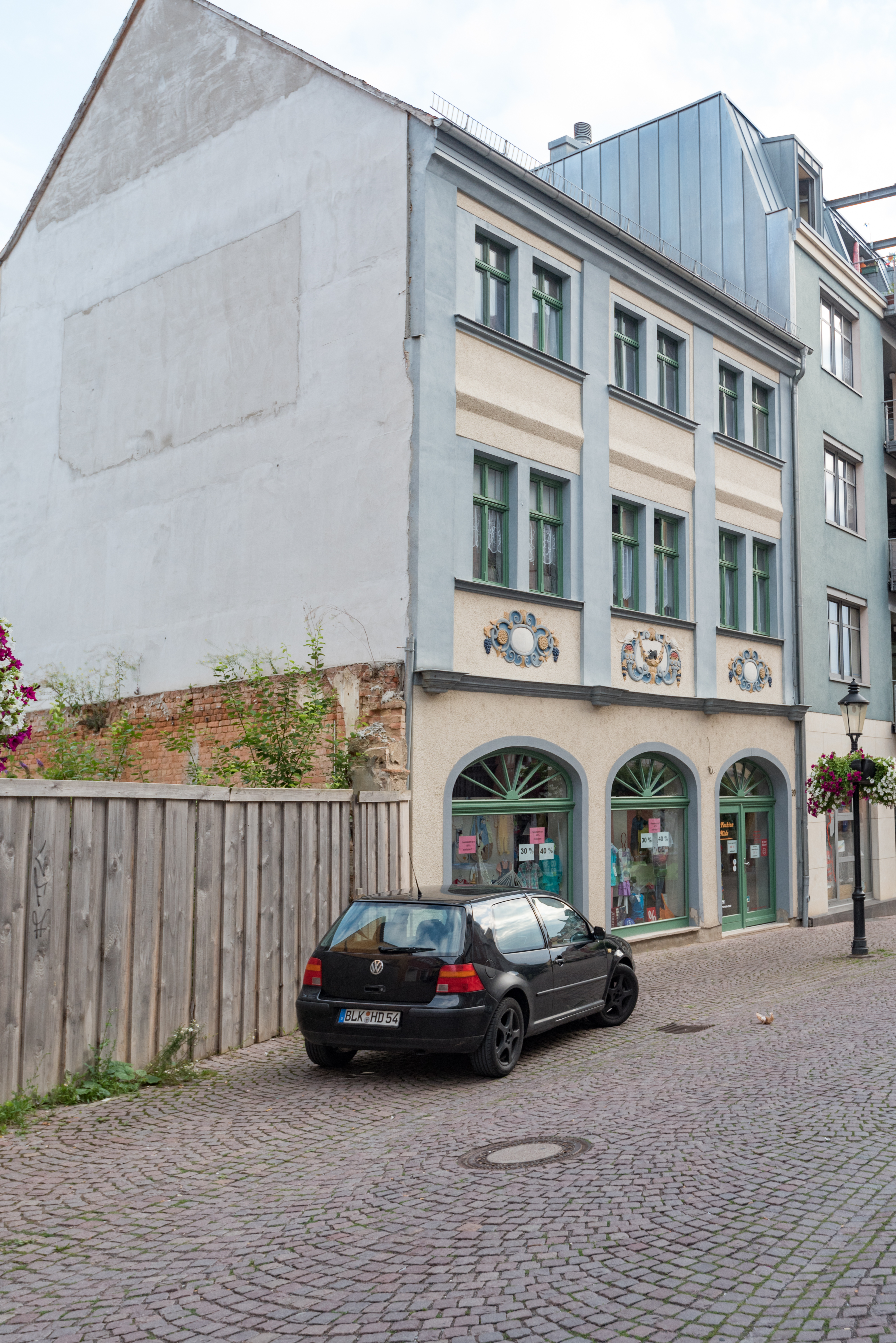 Naumburg (Saale), Salzstraße 39